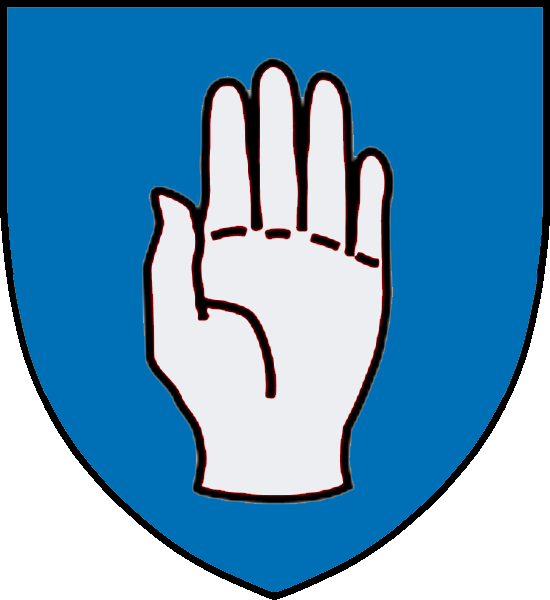 Vapensköld för ätten Hand